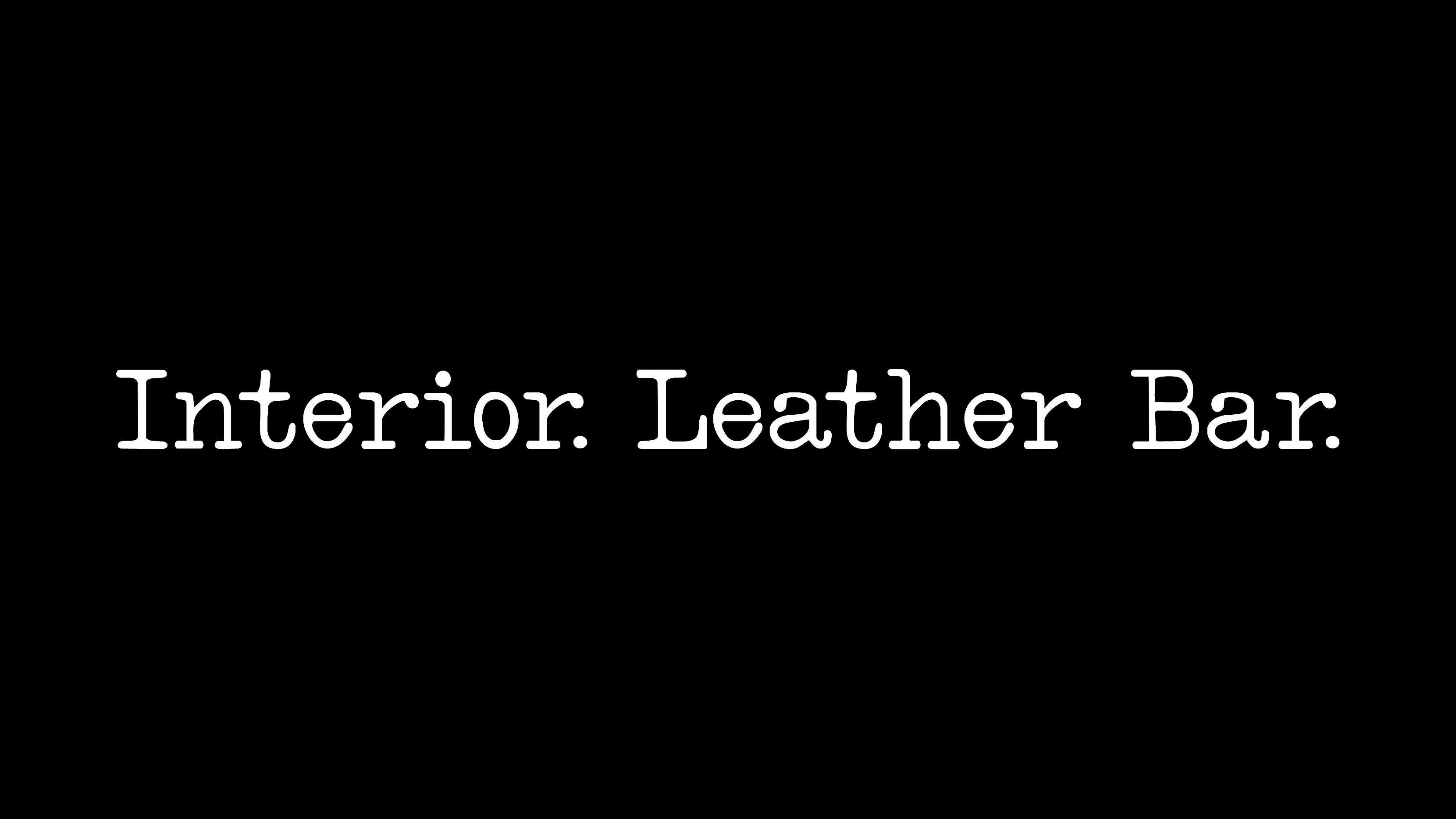 Logotipo de la película Interior. Leather bar., estrenada en 2013.